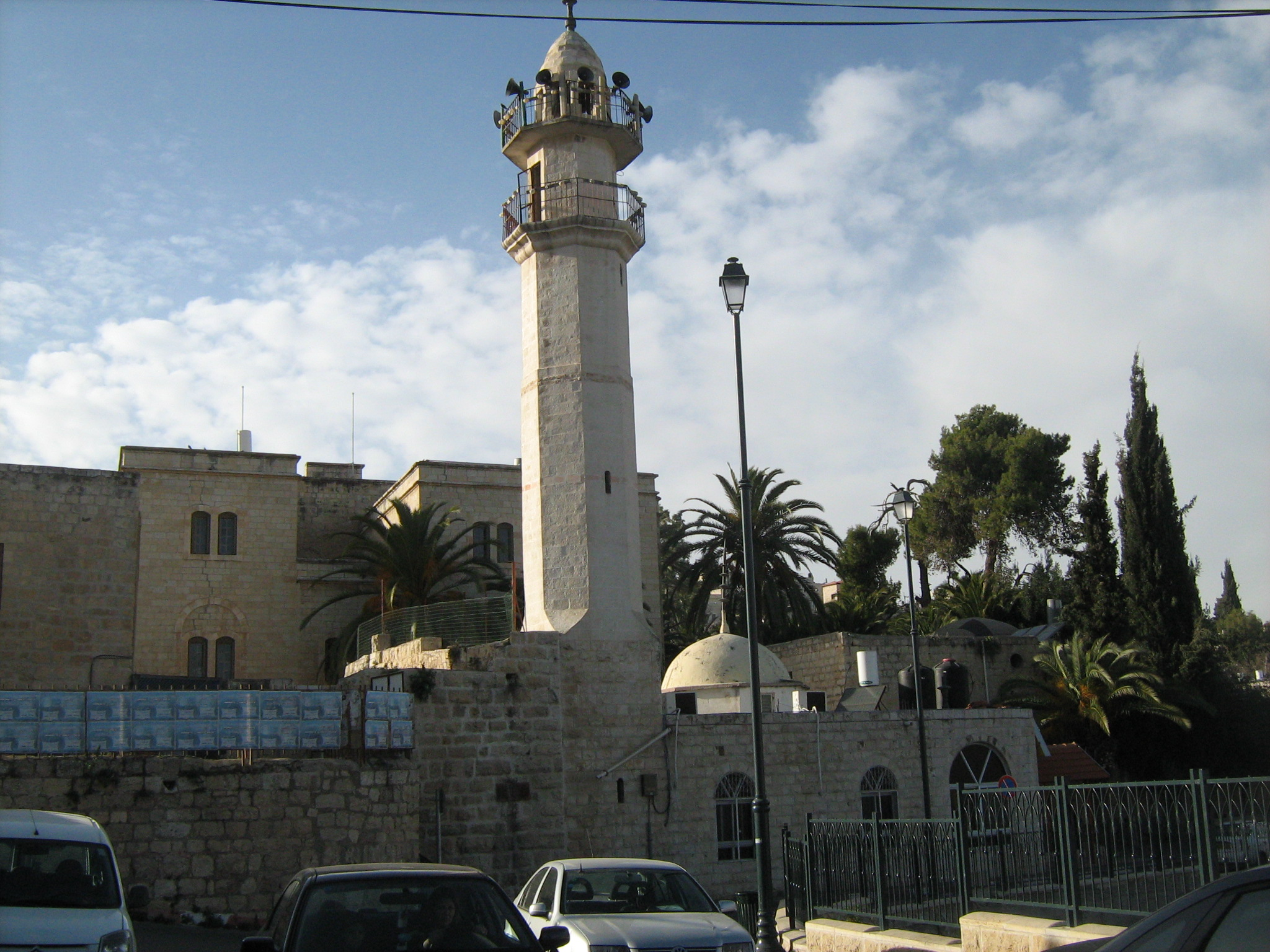 אבו גוש - המסגד